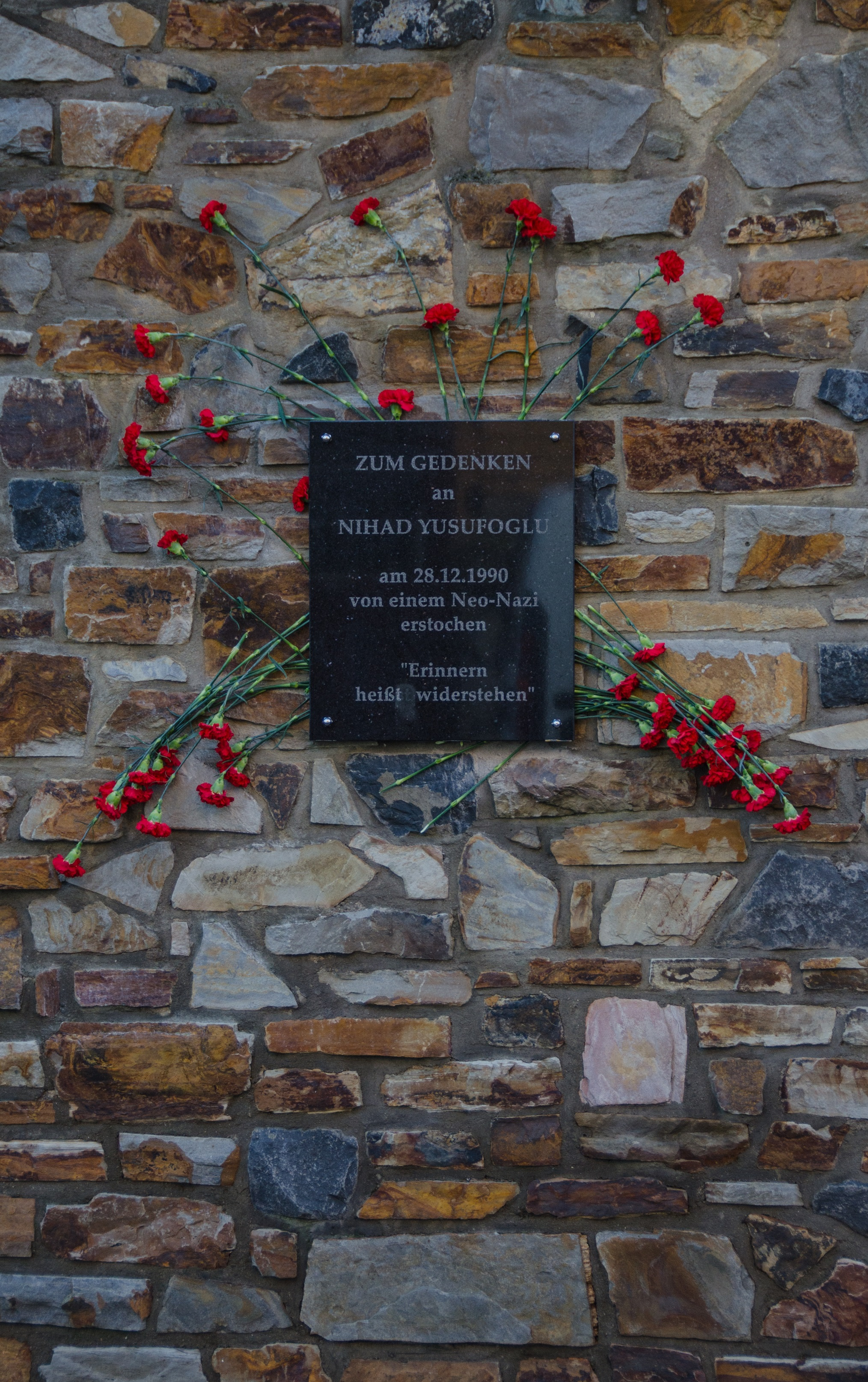 Opfer Rechter Gewalt